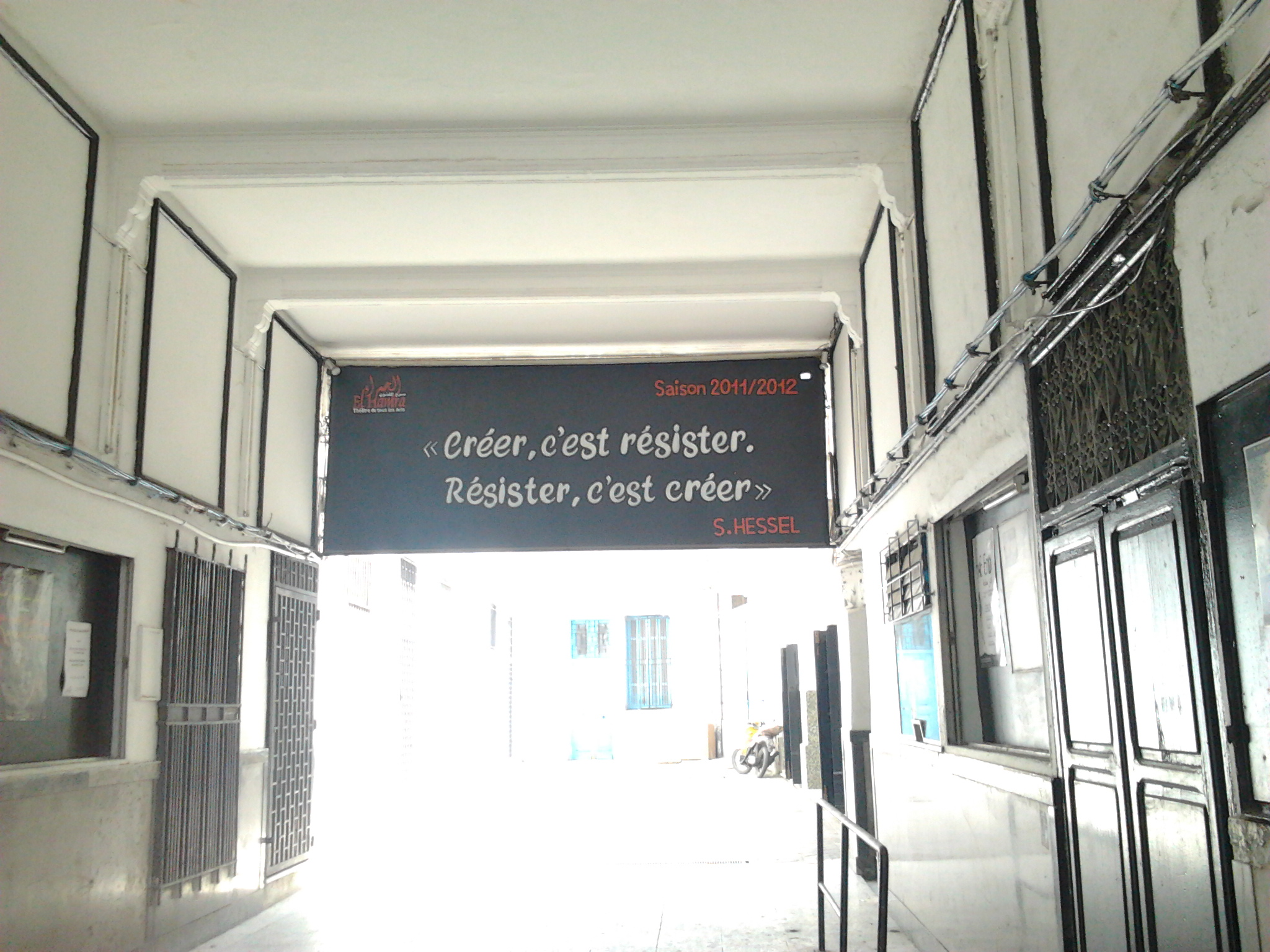 Théâtre "Al Hamra" (Alhambra) - Bab Al Jazira - Al Khirba - Tunis